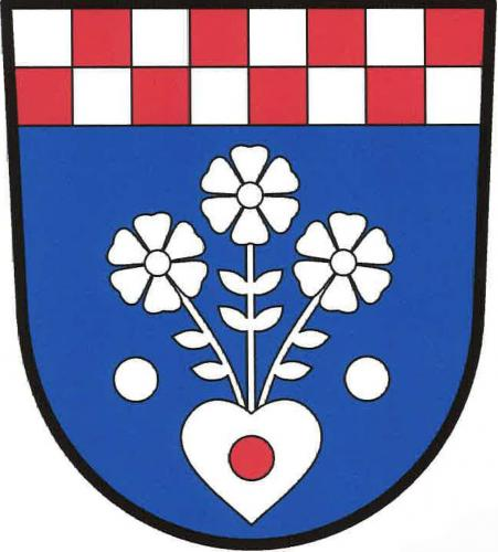 znak, Rychnov na Moravě, okres Svitavy